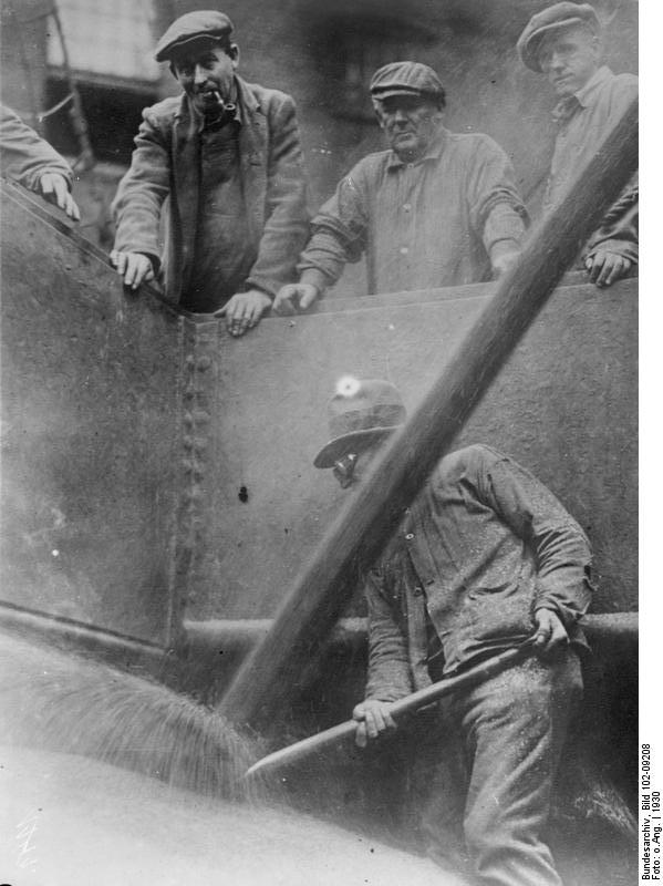 Der grösste Getreidespeicher der Welt in Buffalo/Amerika ! Wie ein Wasserfall stürzt das Getreide in die Speicher, um von einem Arbeiter, mit Augenschutzbrille versehen, gleichmässig verteilt zu werden.